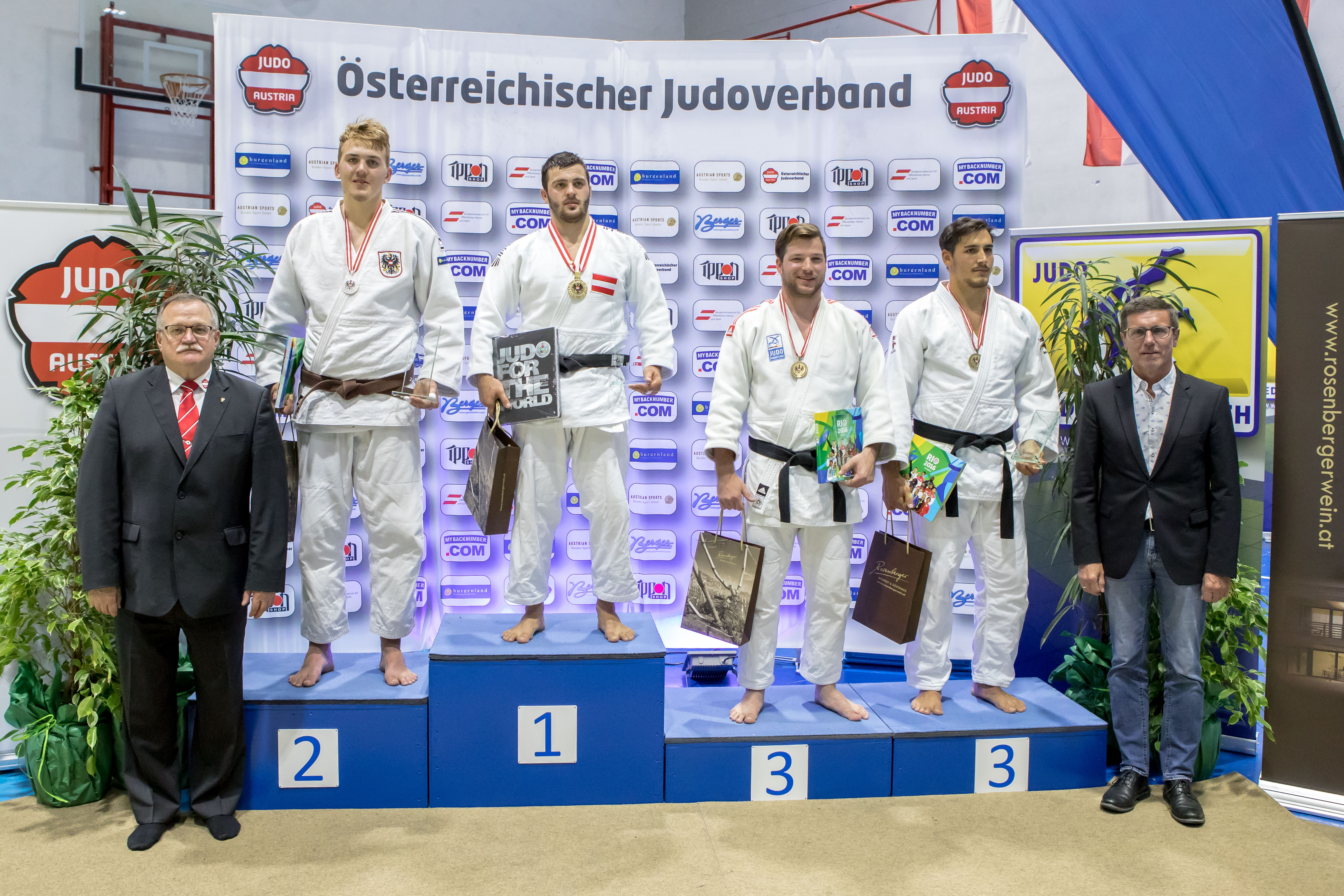 AUSTRIAN CHAMPIONSHIPS KREMS Siegerehrungen -100 kg 1. Platz Marko Bubanja 2. Platz Niko Herzog 3. Platz Christian Pichler, Gábor Geier